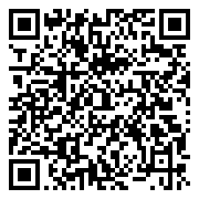 GiroCode